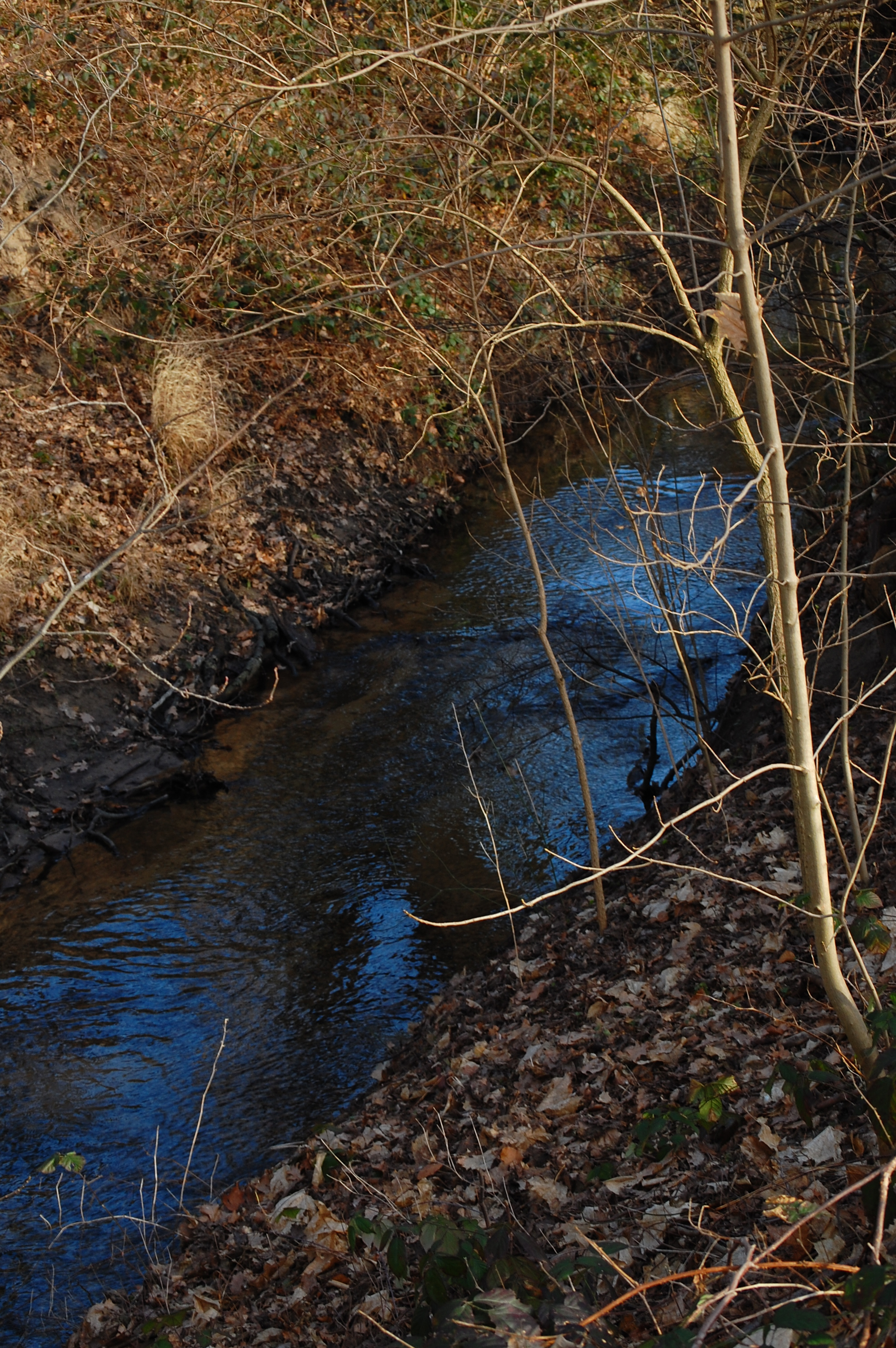 Apfelbach beim Steinrodsee in Weiterstadt